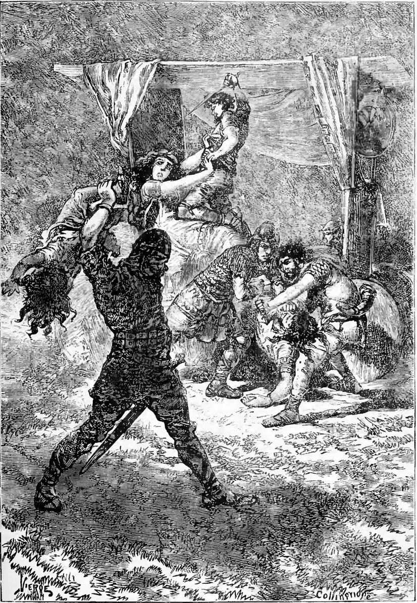 Les assassins n'épargnèrent pas mème sa femme enceinte et son fils enfant.